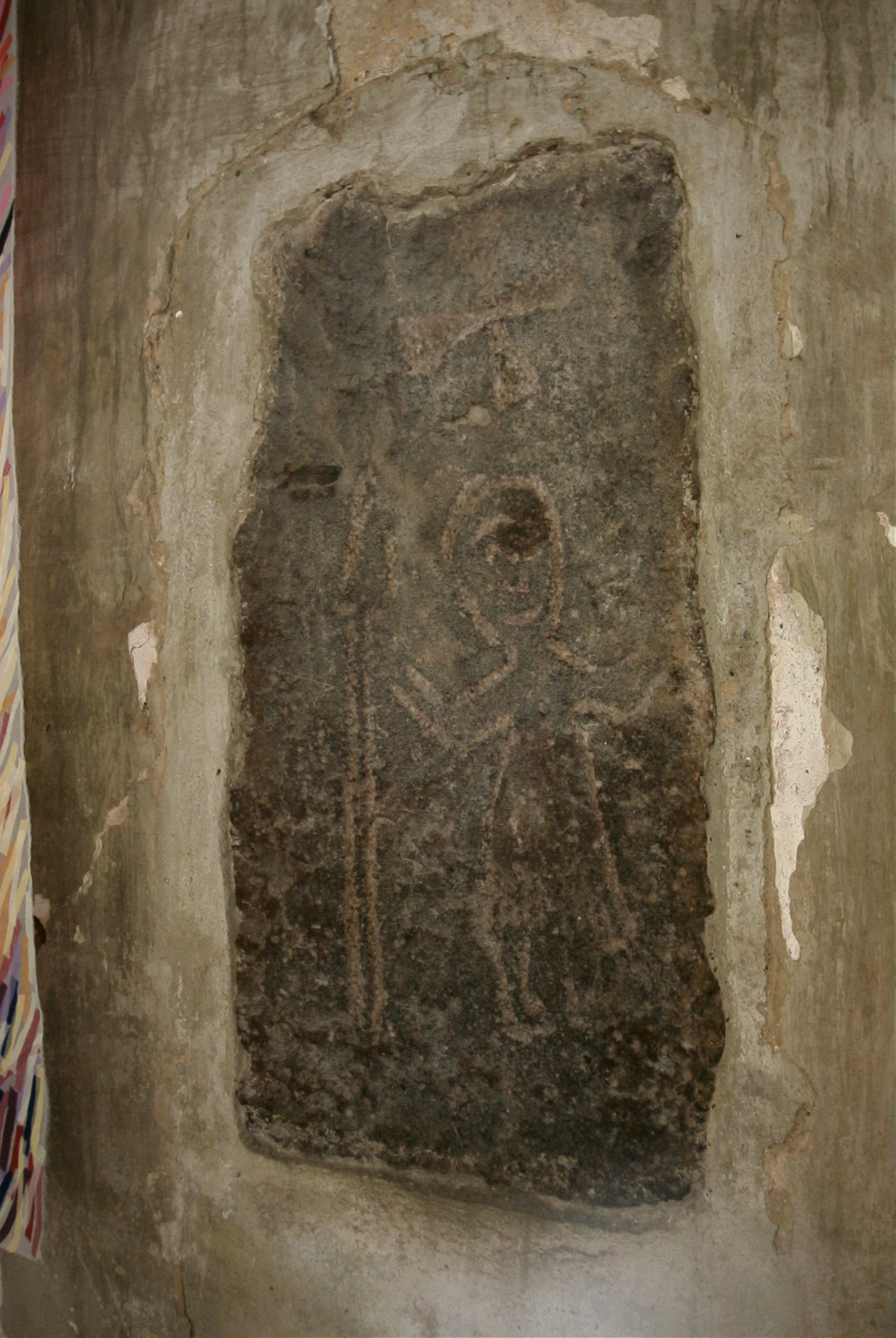 Der Gerovit-, Jarovit- oder Jerovitstein in der Wolgaster Petrikirche